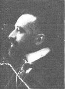 D. Luis Morote Obra del fotógrafo Manuel Compañy.